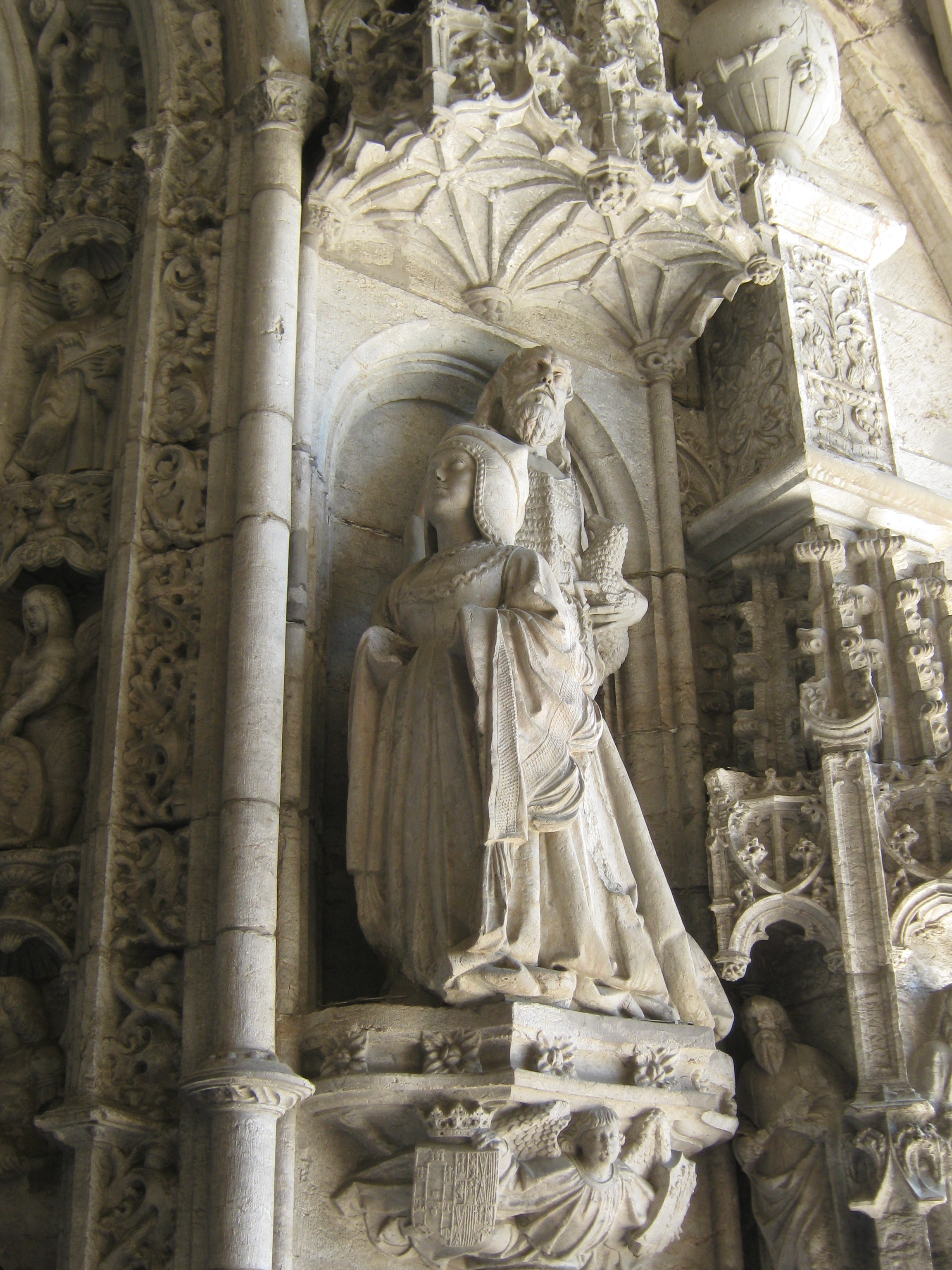 Mosteiro dos Jerónimos - Main door detail